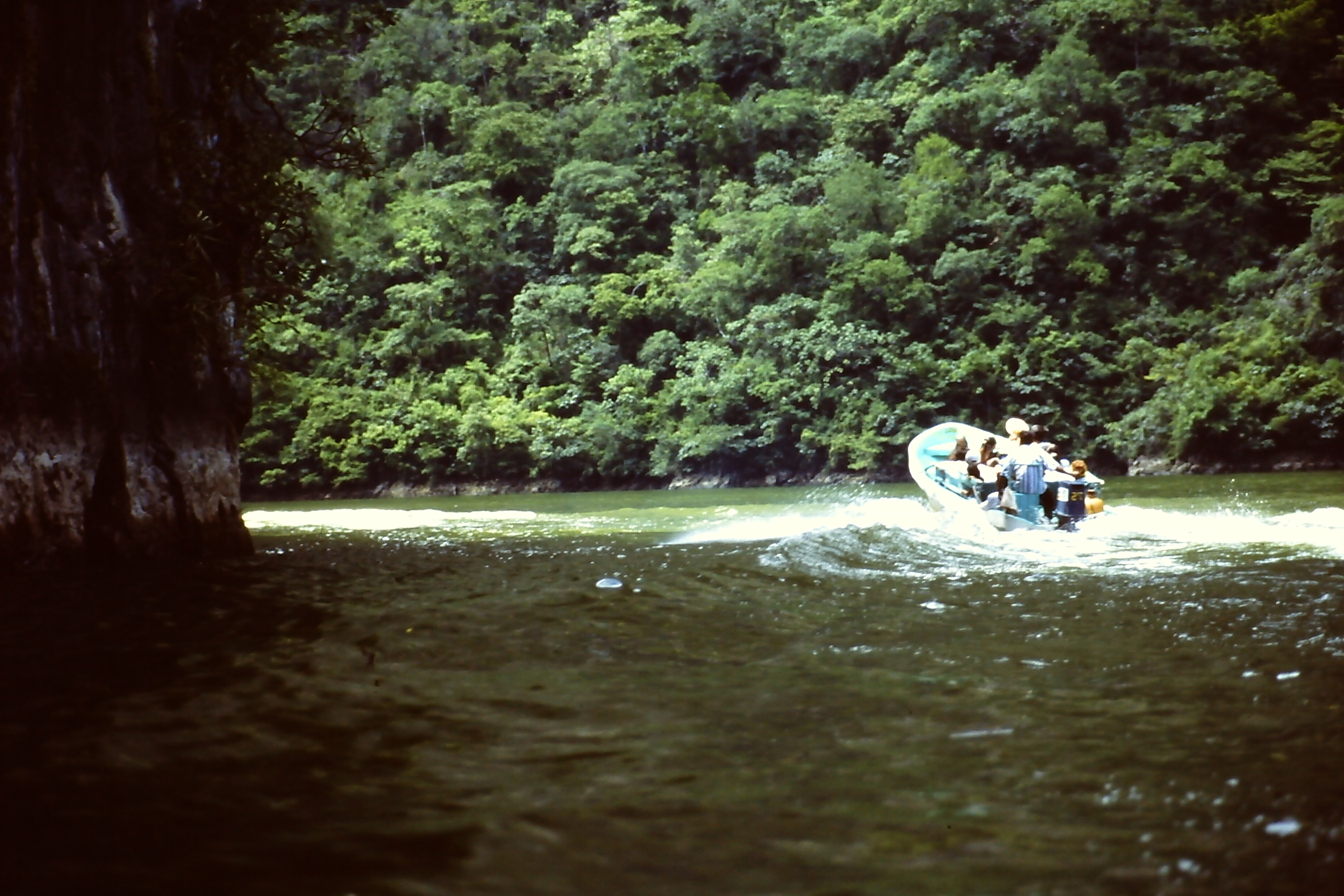 Boat trip on the canon del sumidero